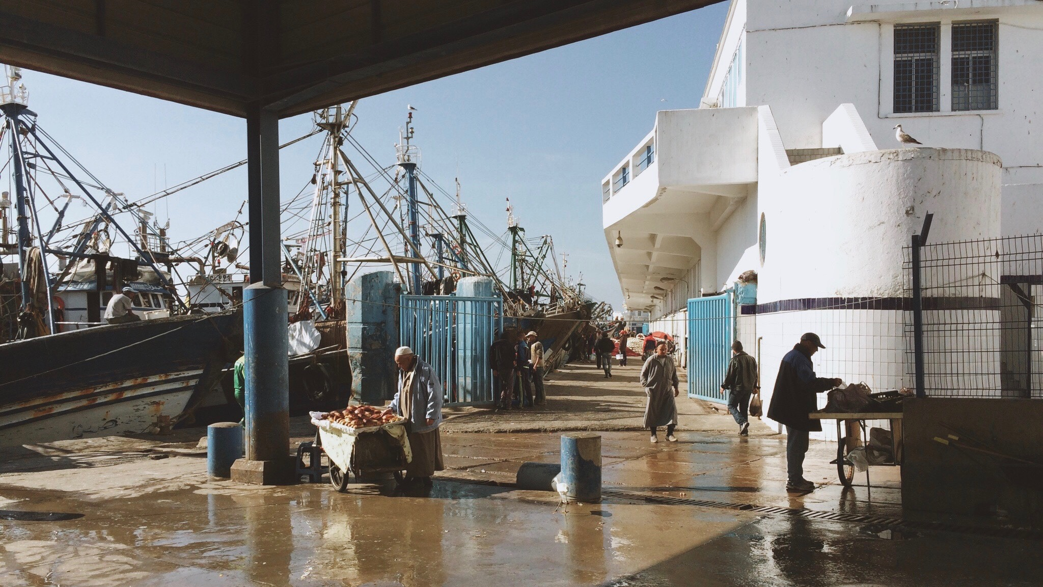 ميناء الدار البيضاء